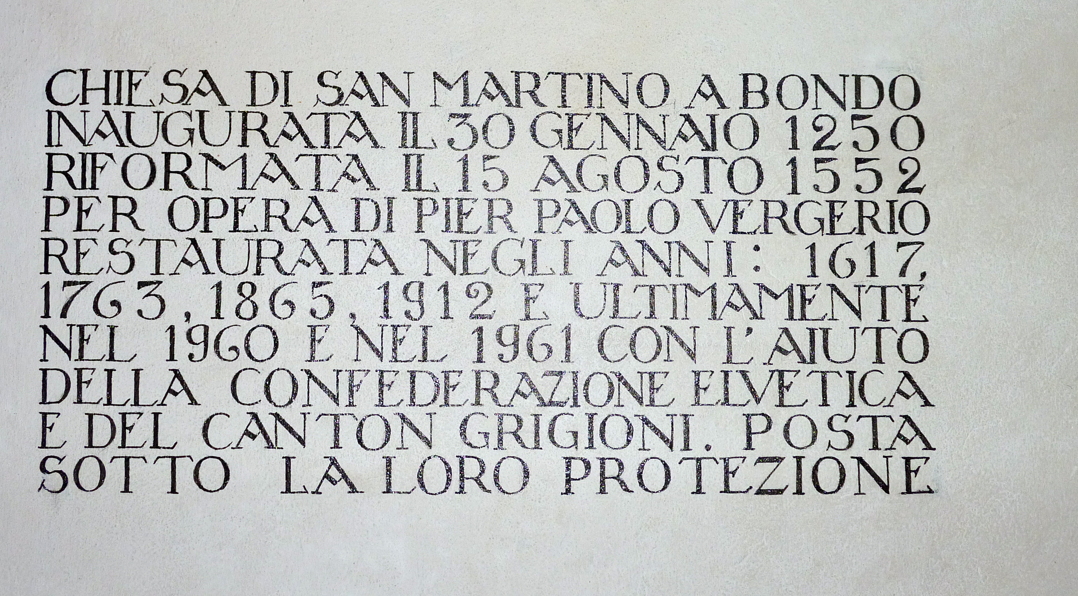 Reformierte Kirche S. Martino (Bondo): Inschrift